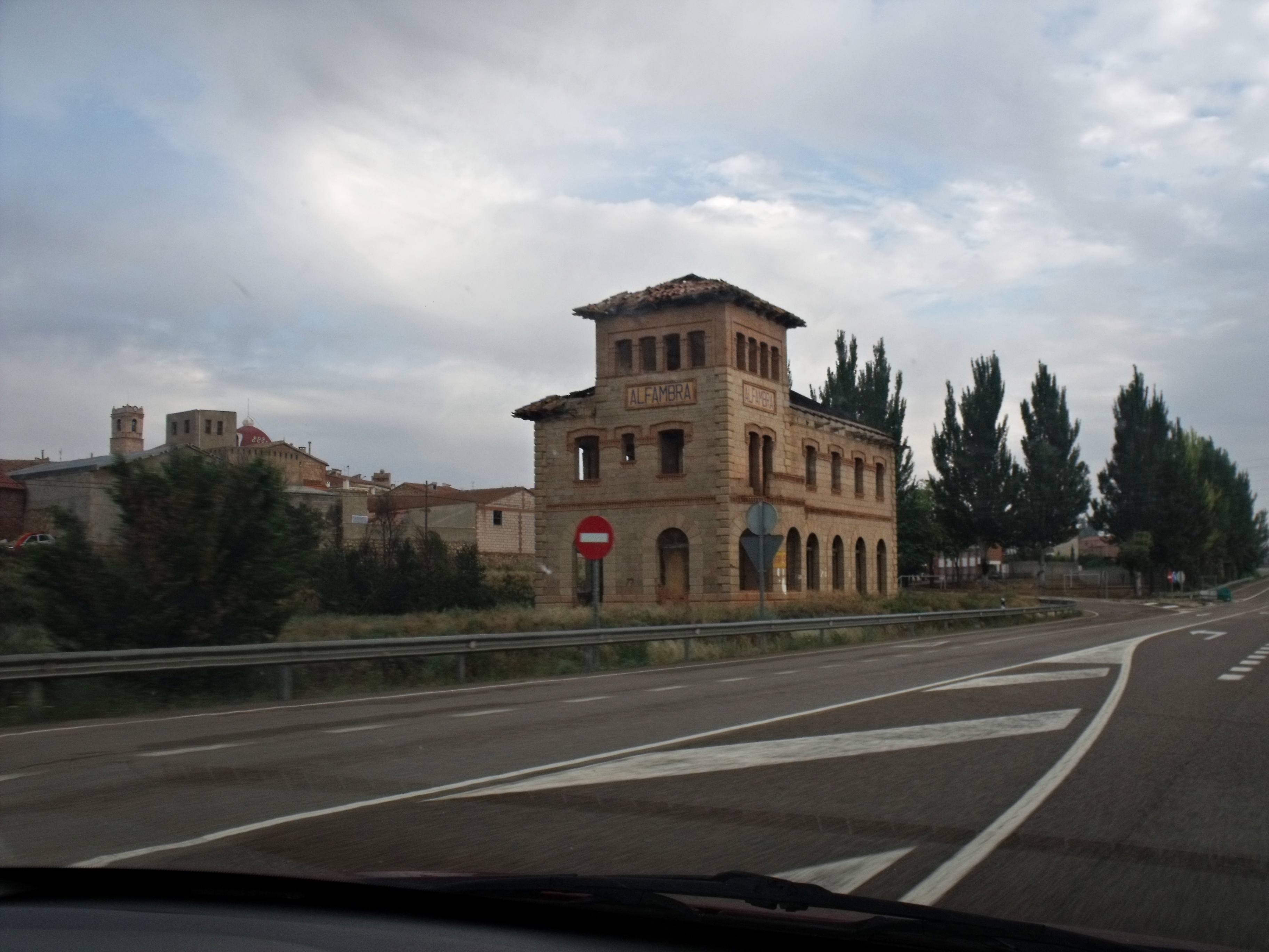 Estación de ferrocarril de Alfambra. En desuso.